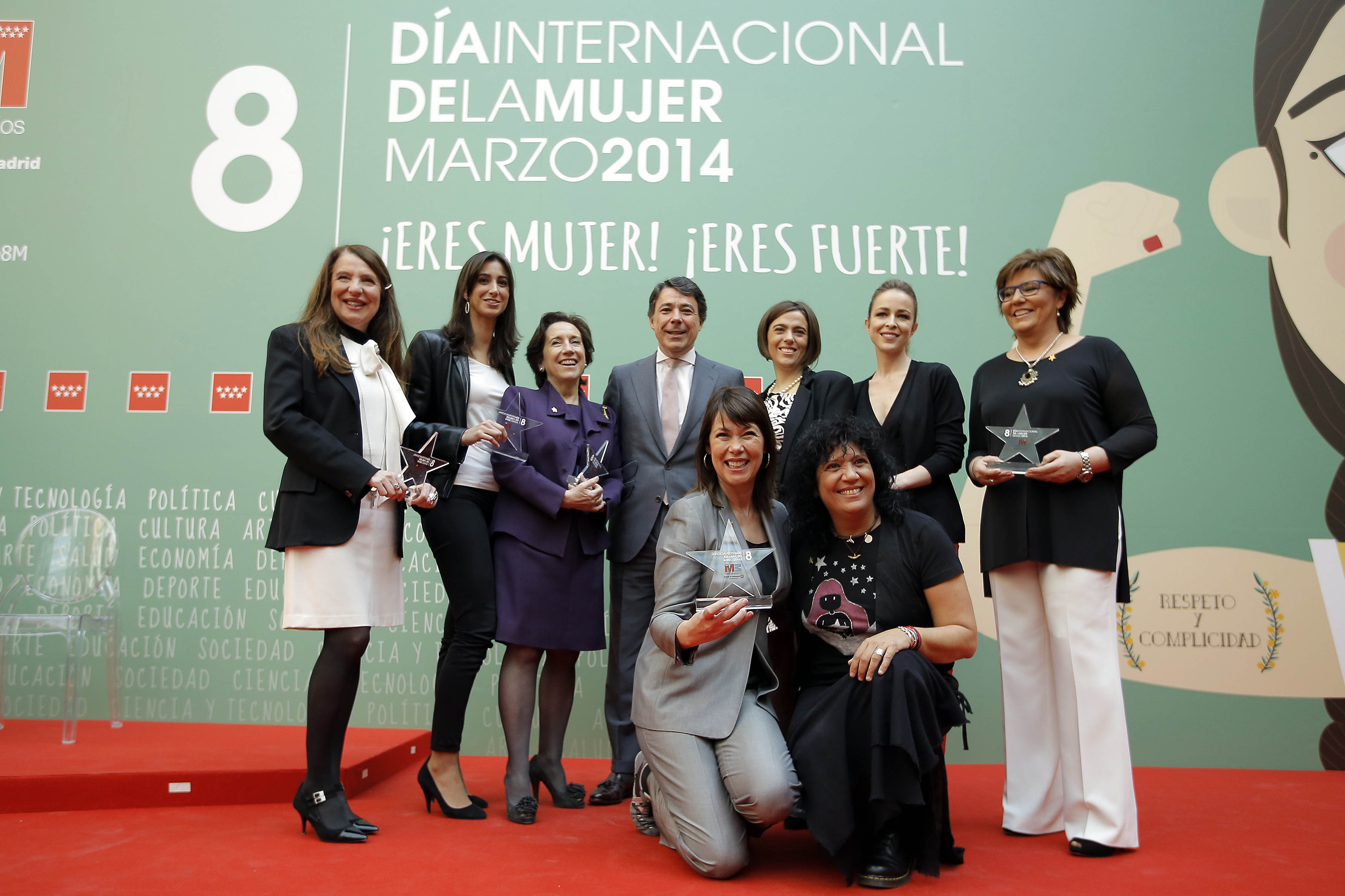 Conmemoración Día de la Mujer de la Comunidad Autónoma de Madrid. Resultaron premiadas la investigadora Guadalupe Sabio, a la directiva María Fanjul, a la empresaria Sara Navarro, a las periodistas María Escario y Victoria Prego, a la actriz Silvia Abascal y a la cineasta Mabel Lozano